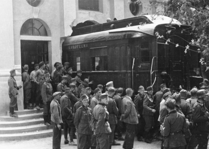 Frankreichfeldzug, Compiegne, 21.6.1940